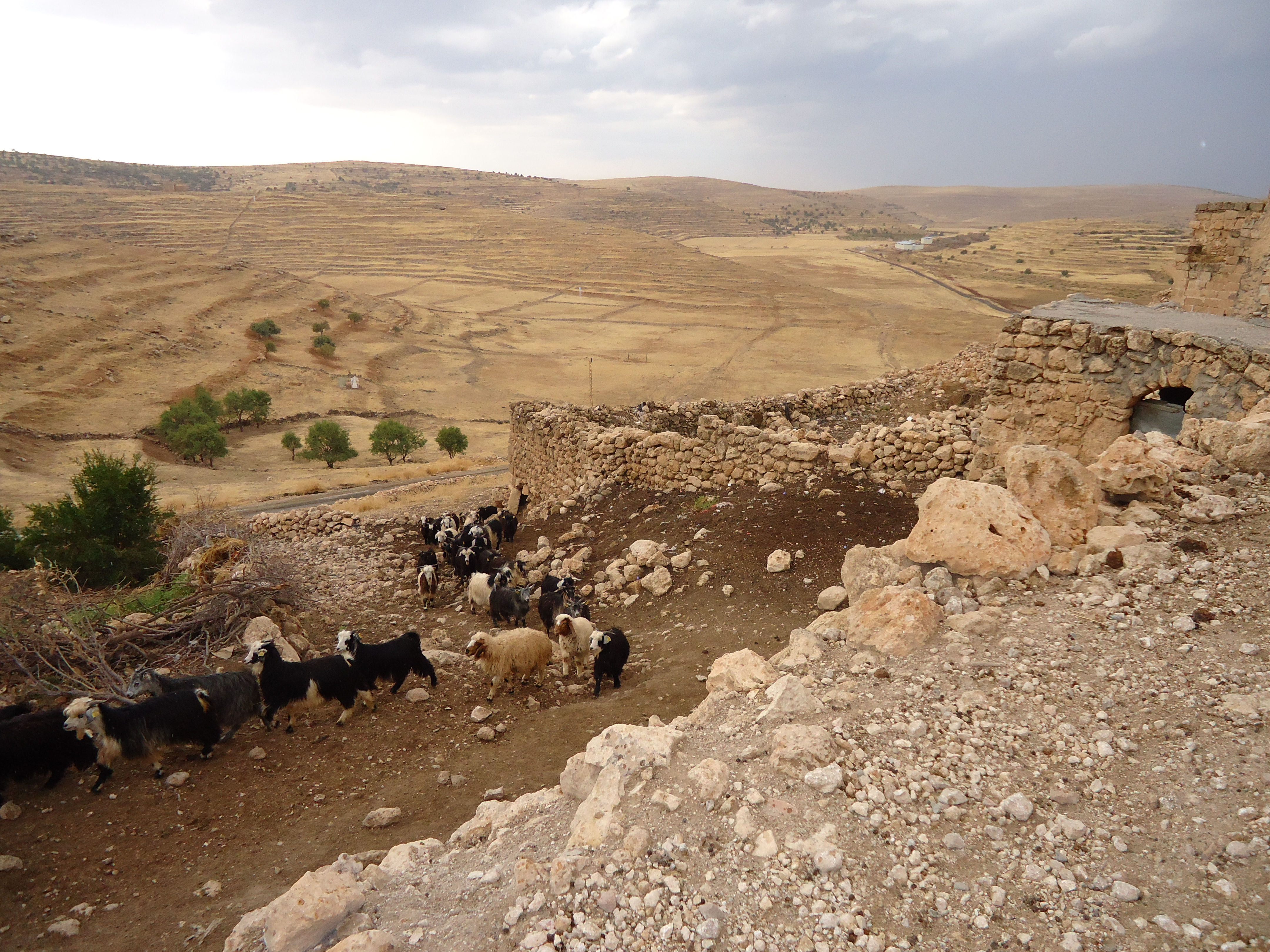 Aramäisches Dorf im Tur Abdin